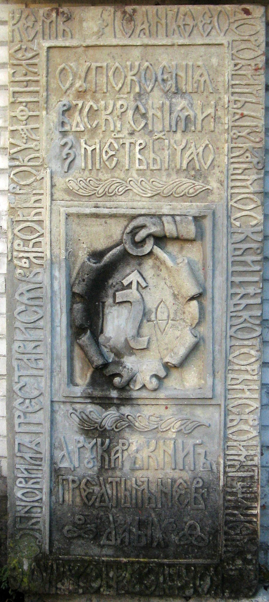 Надгробие Ивана Фёдорова (копия)